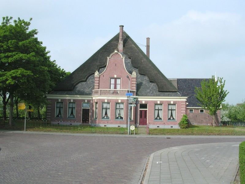 De stolpboerderij 'Welgelegen' in Wognum, gebouwd in 1879. The farm 'Welgelegen' in the village of Wognum. Bild in 1879.